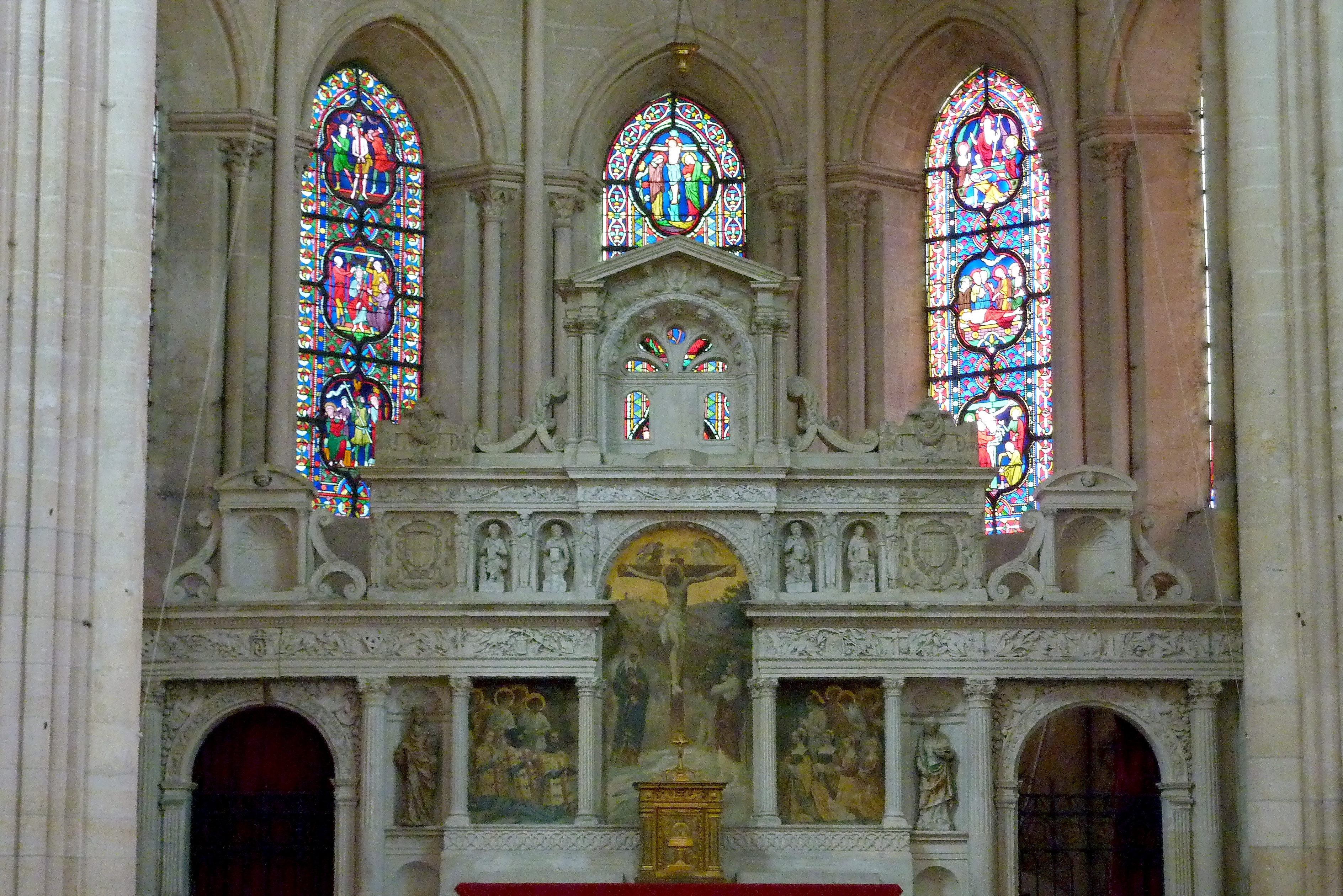 Hauptaltar in der katholischen Kirche Notre-Dame in Taverny, einer Gemeinde im Département Val-d'Oise (Île-de-France), aus Stein, aus dem 16. Jahrhundert